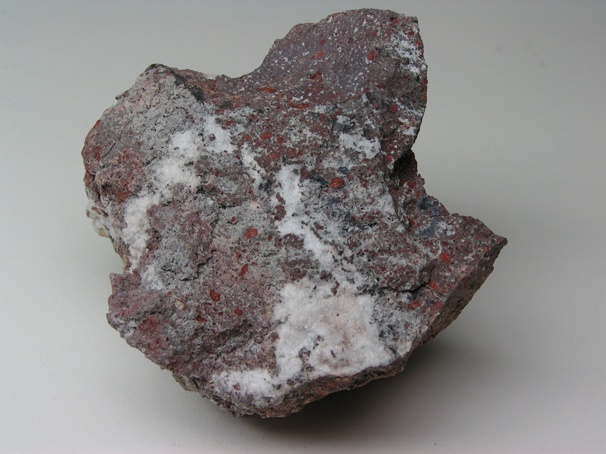 Limburgitgestein vom Kaiserstuhl